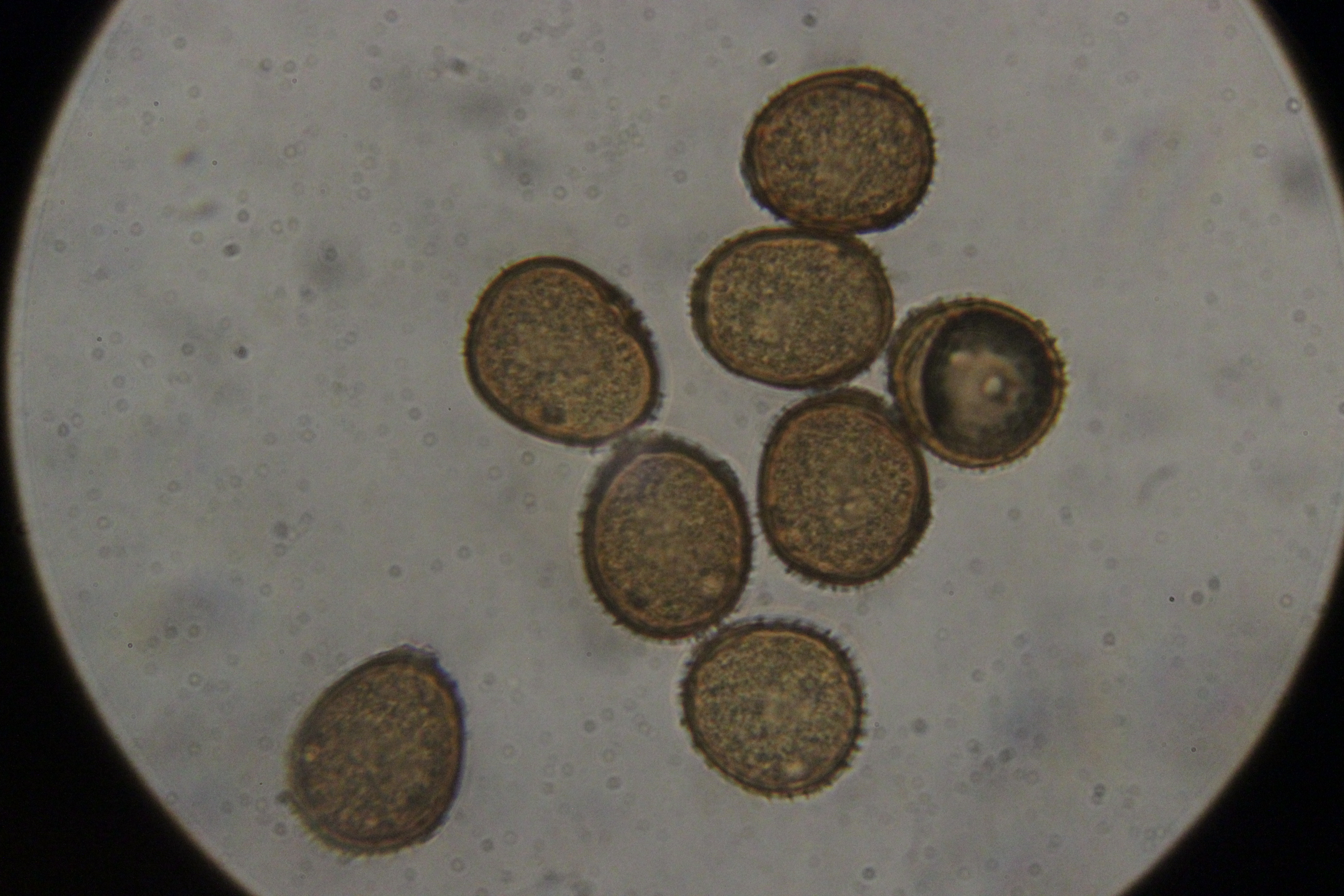 Puccinia acetosae on Rumex acetosa